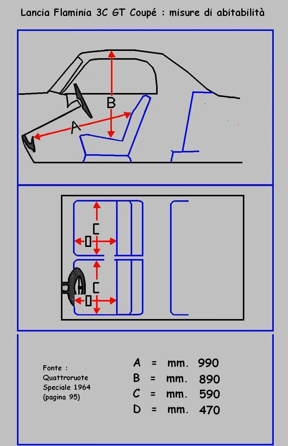 Disegno creato autonomamente, mediante il programma "Paint" di Windows XP, traendo le informazioni dalla pagina 95 di "Quattroruote Speciale 1964"